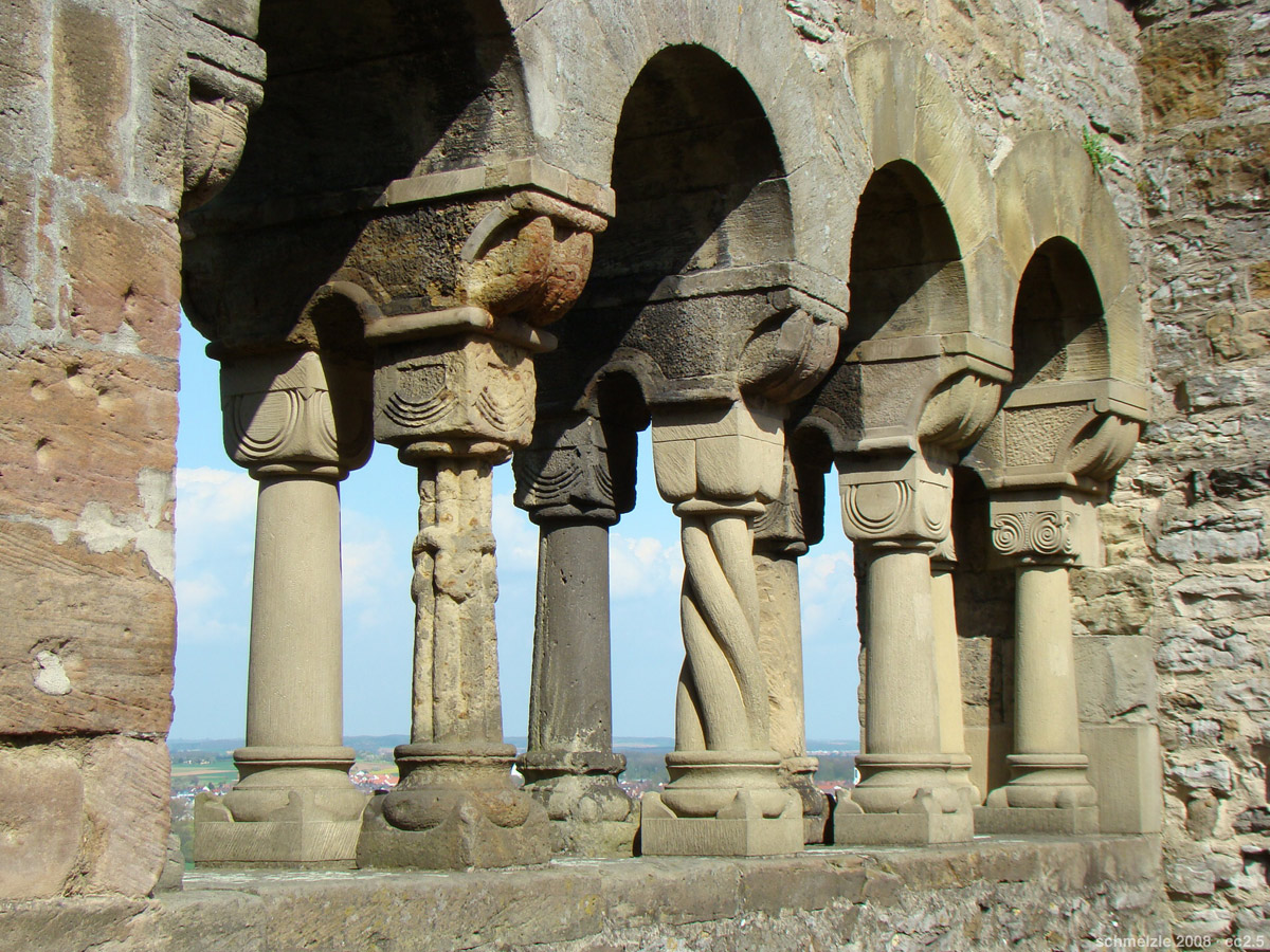 Bad Wimpfen, Burgviertel: Palas-Arkaden der ehem. Pfalz Wimpfen.